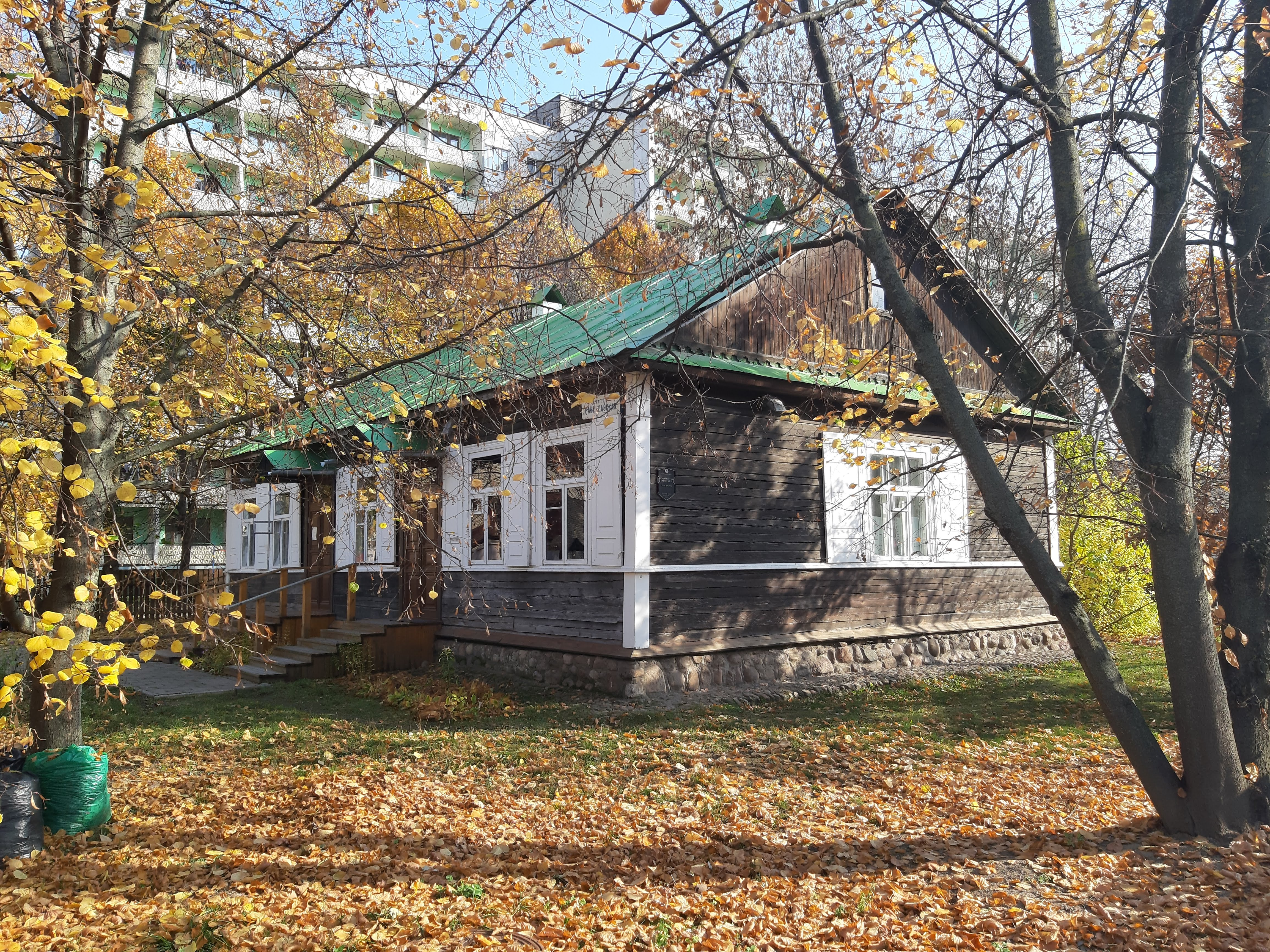 Мінск. З Добрых Мысляў у цэнтр